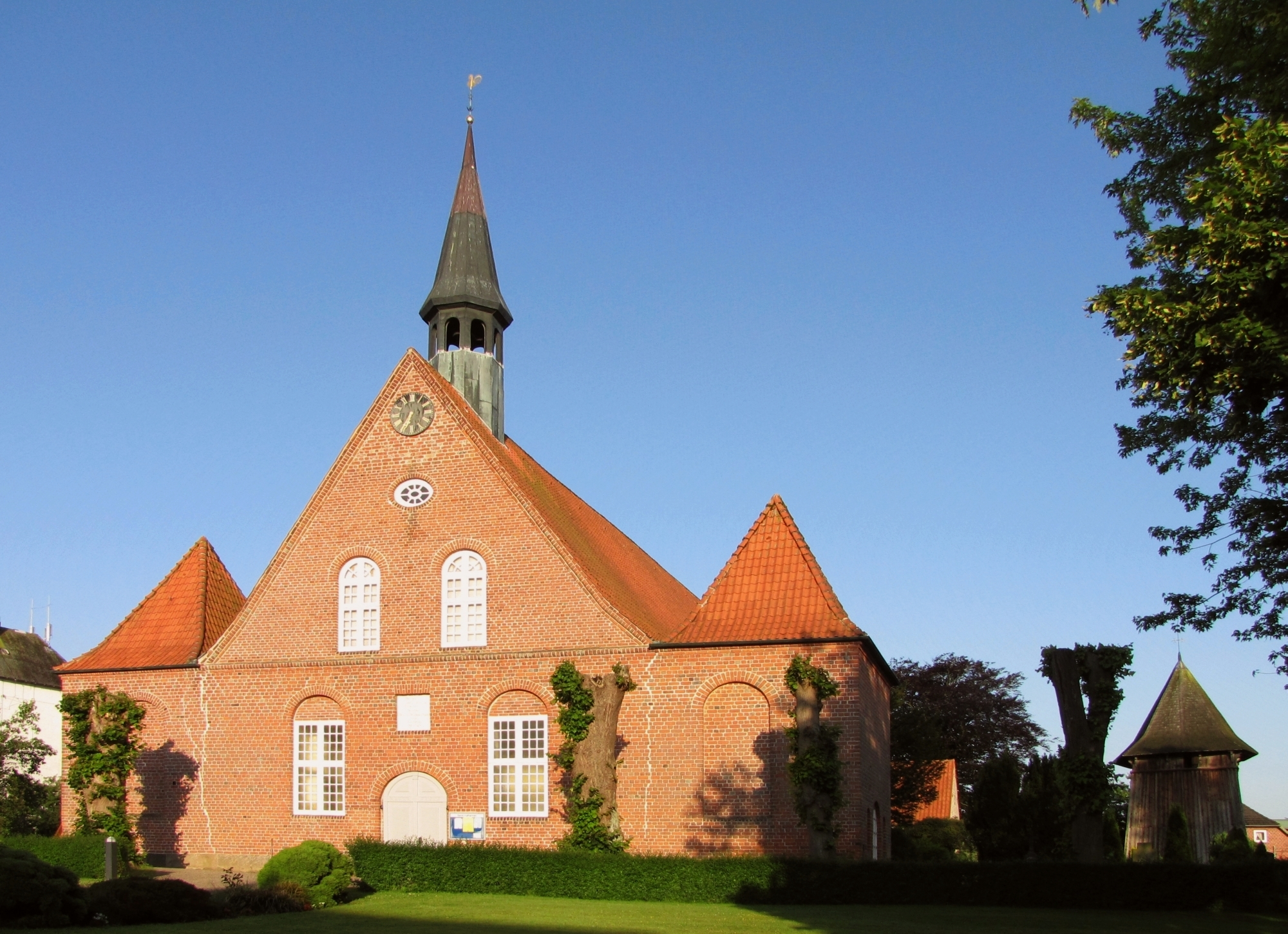 Ev.-luth. St. Katharinen-Kirche in Gelting Angeln Kreis Schleswig-Flensburg Schleswig-Holstein - Foto 2012 Wolfgang Pehlemann Steinberg-Ostsee IMG_9620